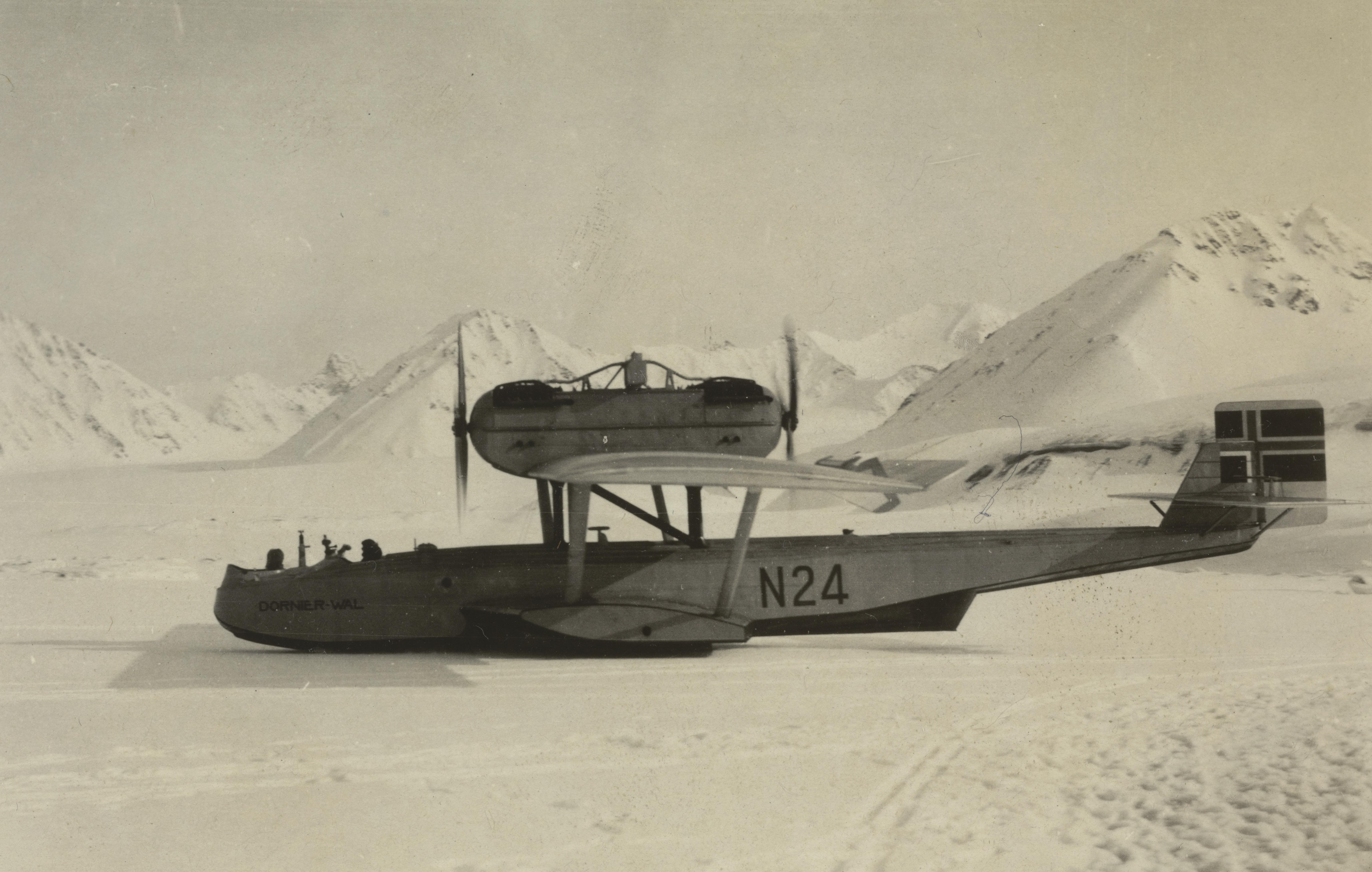 Bildet er hentet fra Nasjonalbibliotekets bildesamling Ny-Ålesund, Svalbard